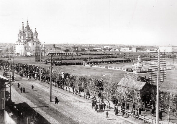 Богородице Рождественский собор